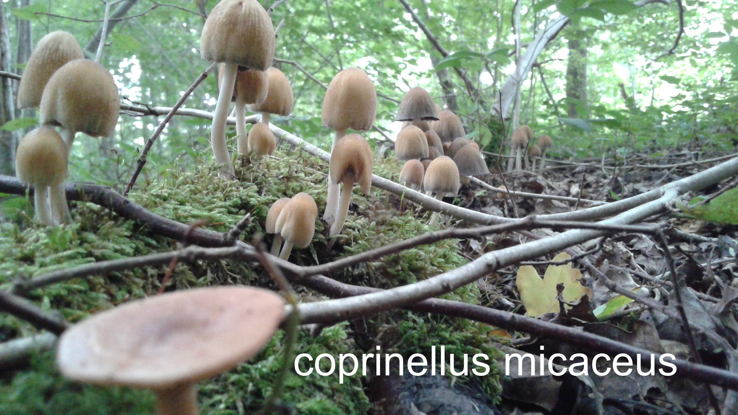 champignon coprinellus micaceus (vue de coté) sur l'arrière plan